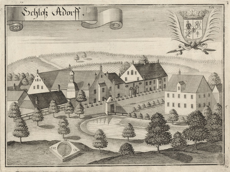 “Schloß Adorff” (Achdorf, heute Stadtteil von Landshut), aus: aus : Beschreibung des Churfürsten- u. Hertzogthumbs Ober- und Nidern Bayrn. Rentamt Landshut, 1723